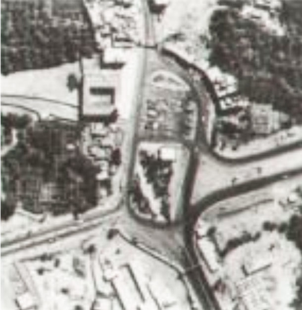 منظر جوي ويظهر فيه مسجد قباء